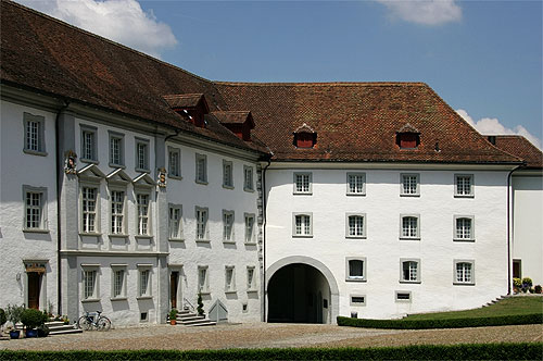 Kloster Sankt Urban: ehem. Frauenhaus und Unteres Tor